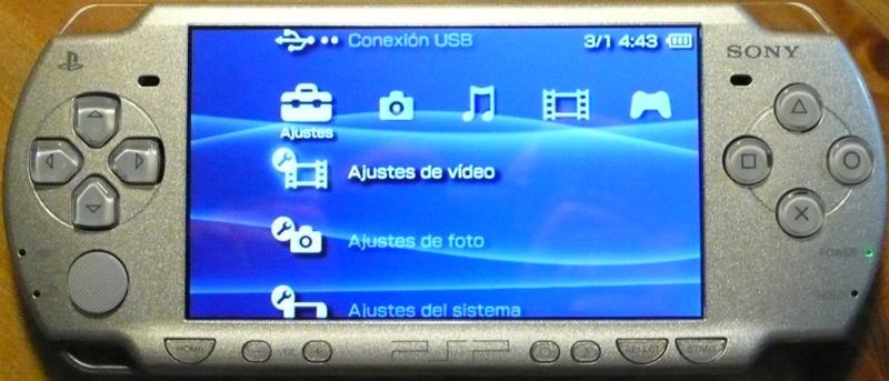 PSP Slim & Lite ice silver